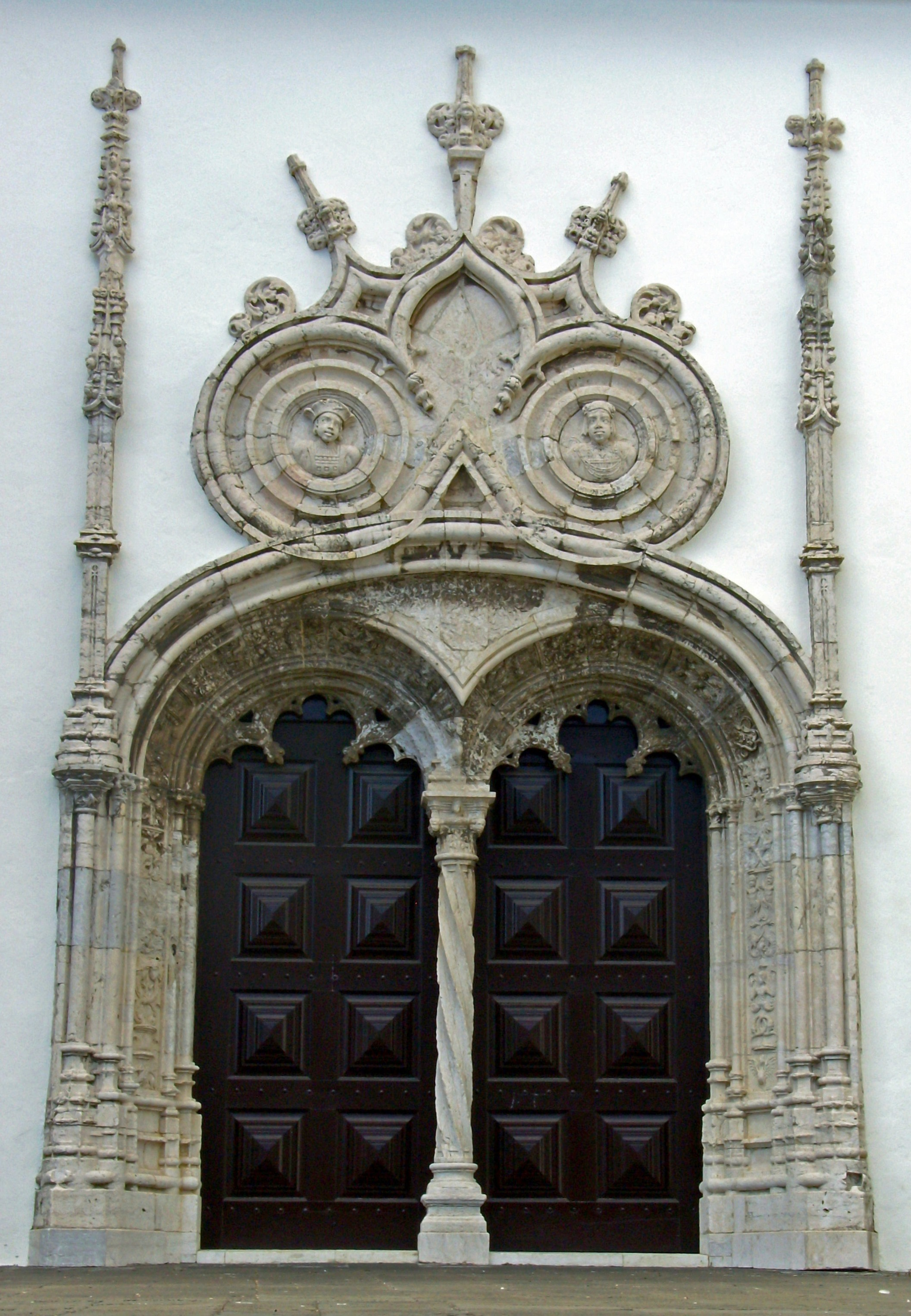 Igreja Matriz de São Sebastião, freguesia de São Sebastião, cidade e concelho de Ponta Delgada, ilha de São Miguel, Açores: portada manuelina.